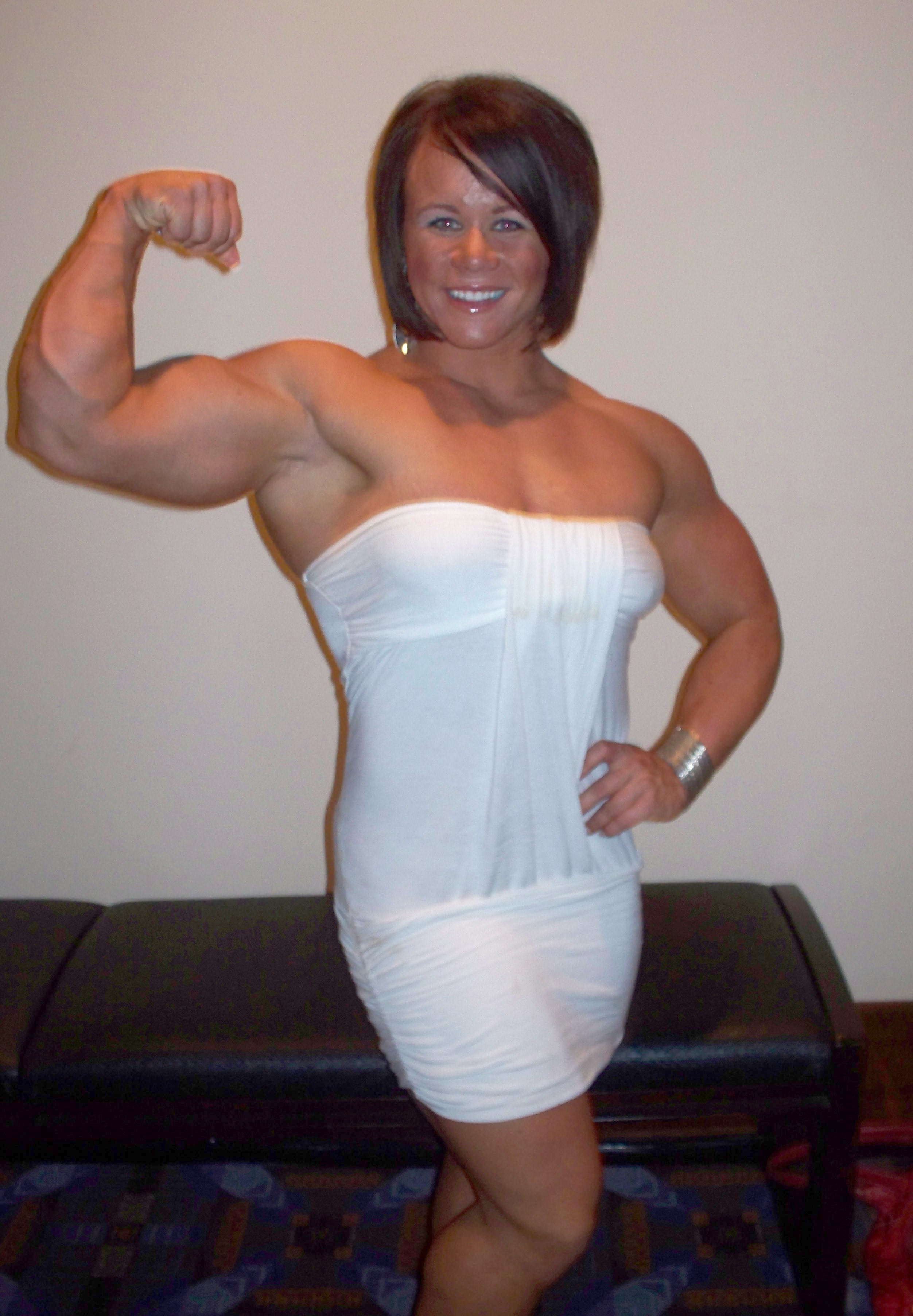 Aleesha Young